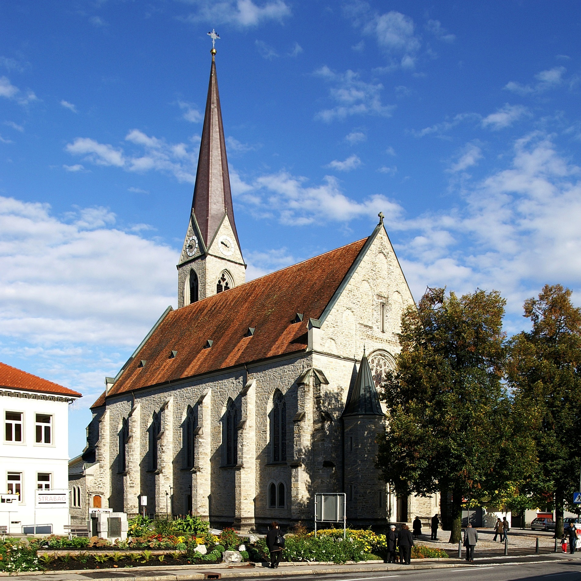 Die Pfarrkirche hl. Sebastian in Schwarzach (Vorarlberg) wurde nach Plan von Peter Huter durch Josef Kröner 1901 bis 1903 im neugotischen Stil erbaut.